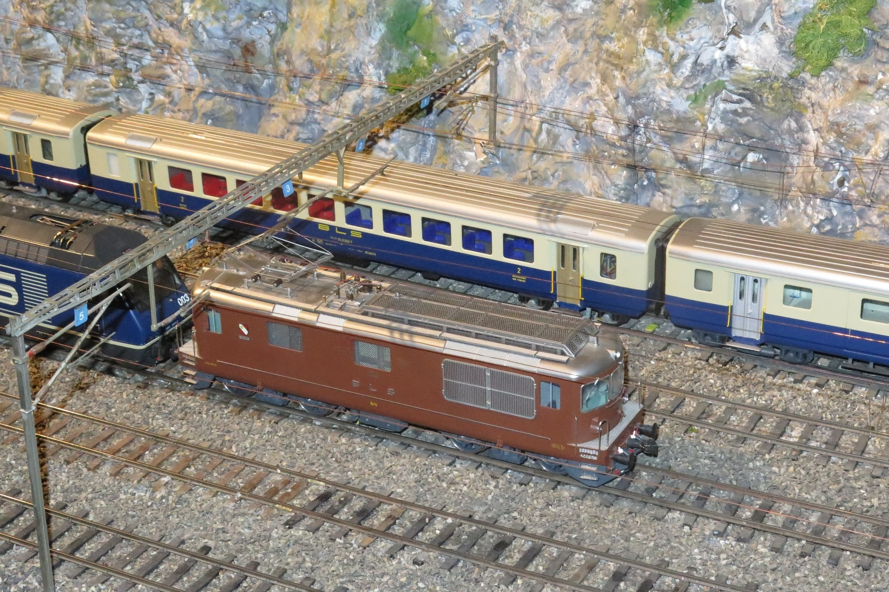 Ausschnitt der Modelleisenbahnanlage der Thuner Eisenbahn-Amateuer (TEA) in der Spur 0. im Hintergrund Reisezugwagen vom Typ EW I der Bern-Lötschberg-Simplon-Bahn (BLS) in blau/crèmer Farbgebung von Hermann, im Vorgergrund die dazugehörenden Lokomotiven vom Typ Re 4/4 in brauner Farbgebung die unter einer Oberleitung fährt. Dieses Bild wurde anlässlich des 2. internationalen Tag der Modelleisenbahn am 2. Dezember 2016 im Vereinslokal der Thuner Eisenbahn-Amateuer in Thun in der Schweiz aufgenommen.